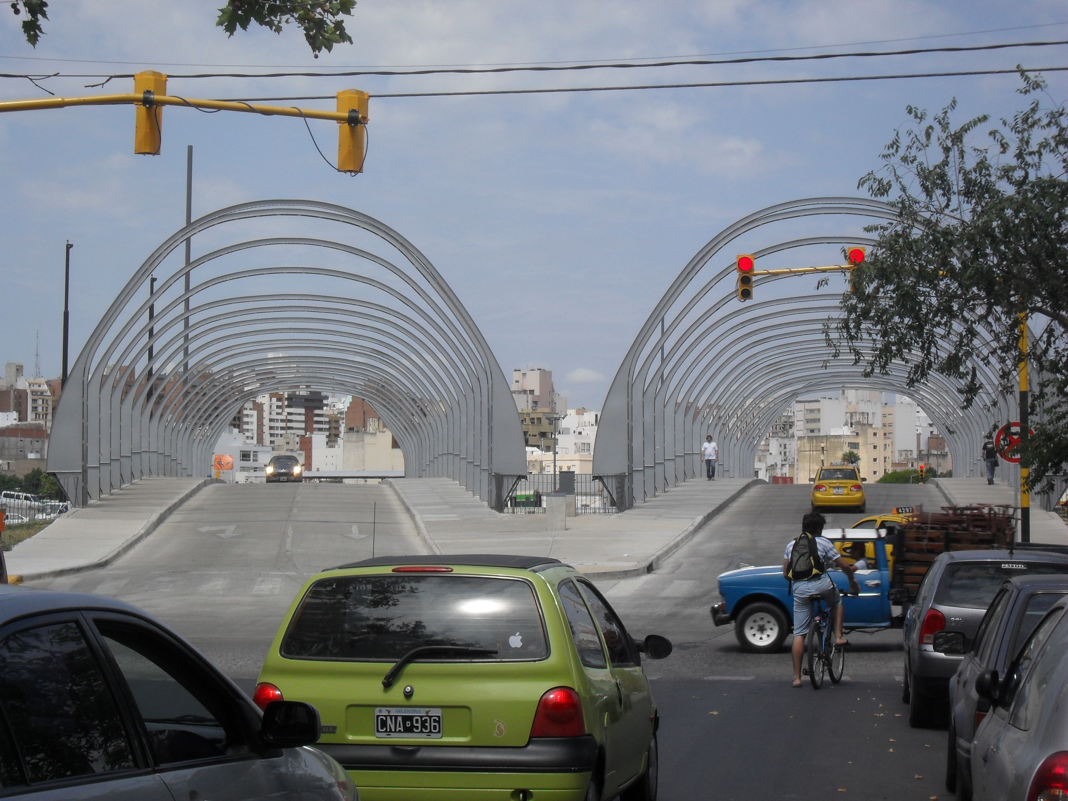 Nuevo puente del Bicentenario, sobre calle Rosario de Santa Fe.